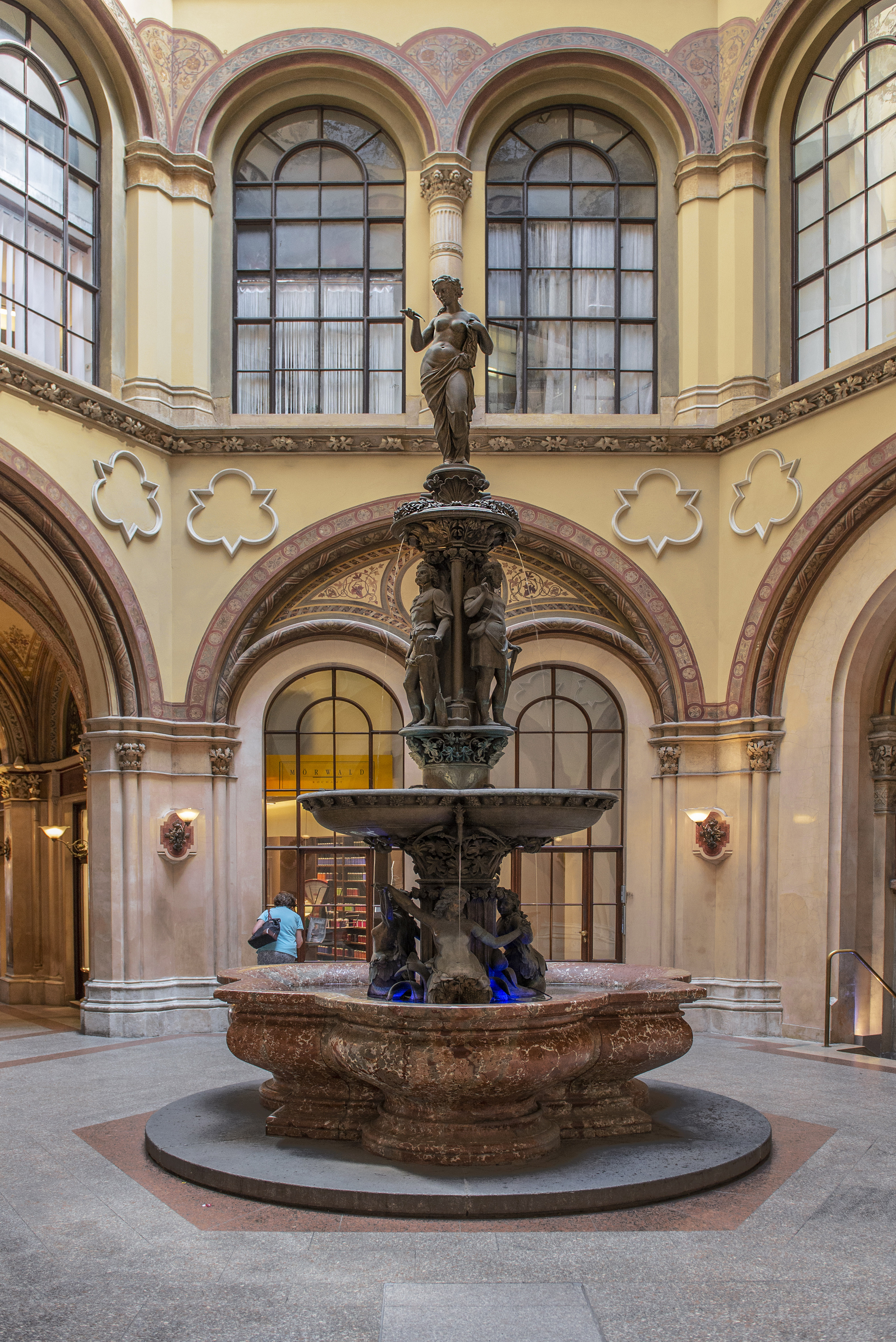 Donaunixenbrunnen